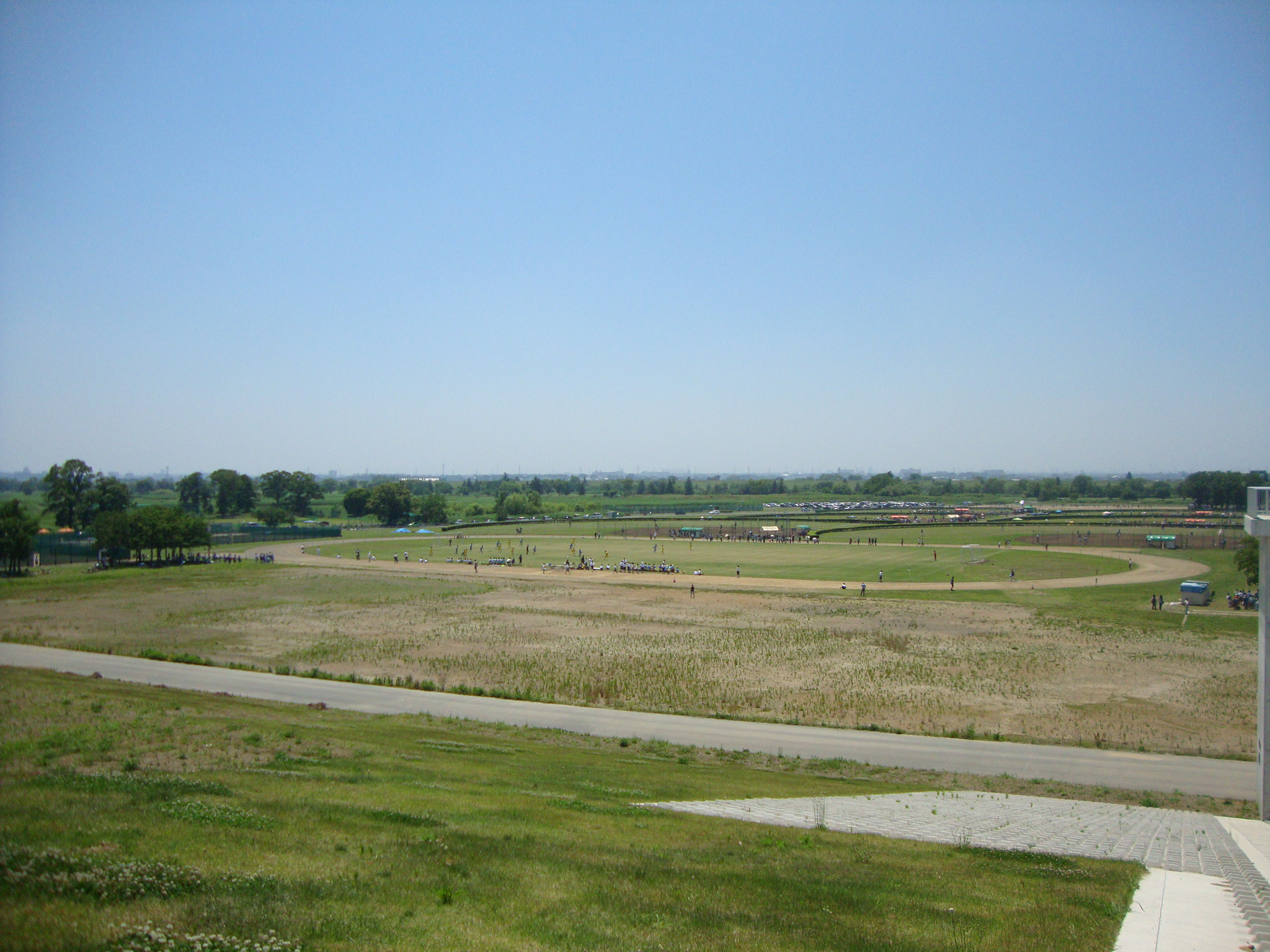 さいたま市桜区の荒川総合運動公園のサッカー場の遠景。